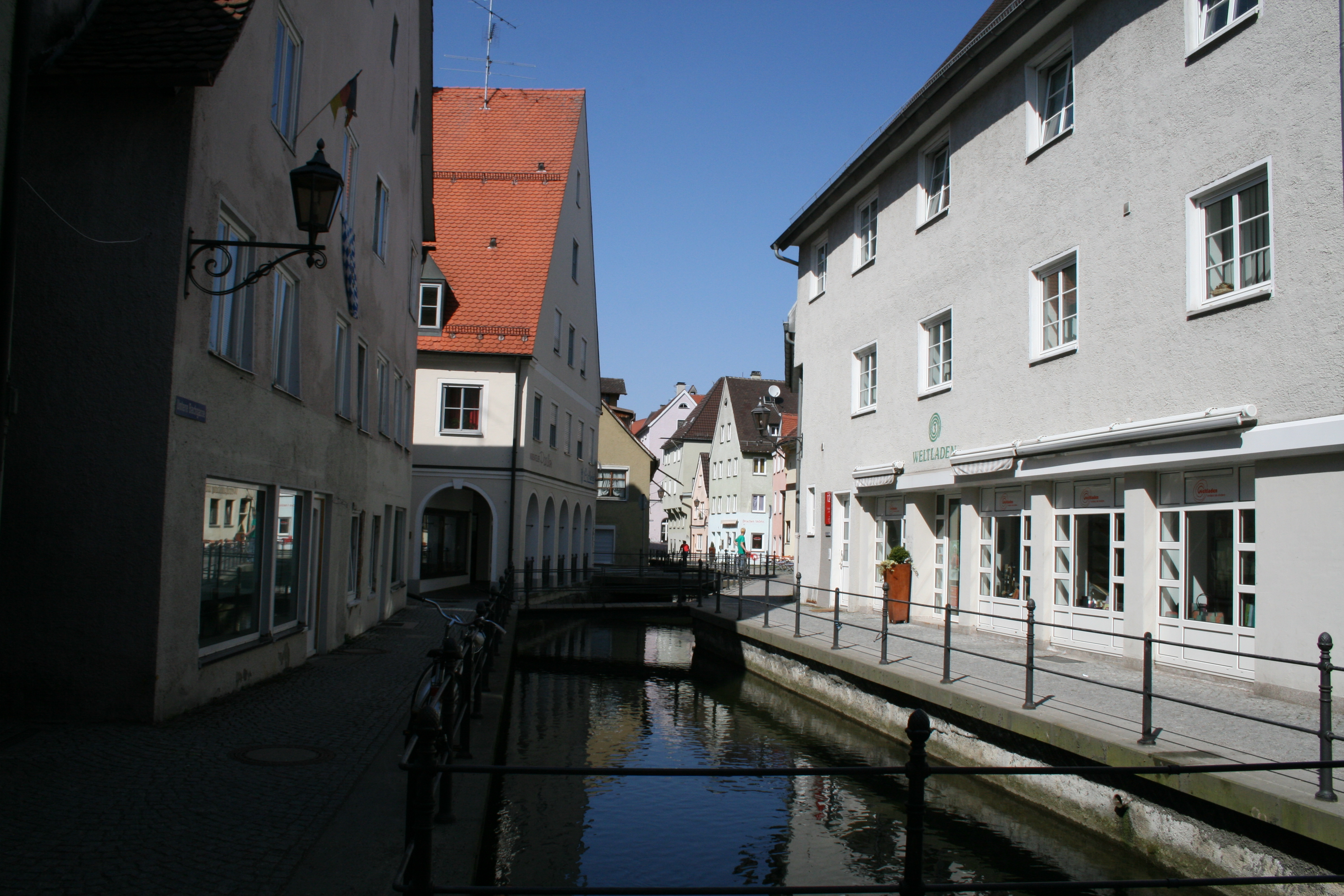 Der Memminger Stadtbach vom Roßmarkt in Richtung Marktplatz